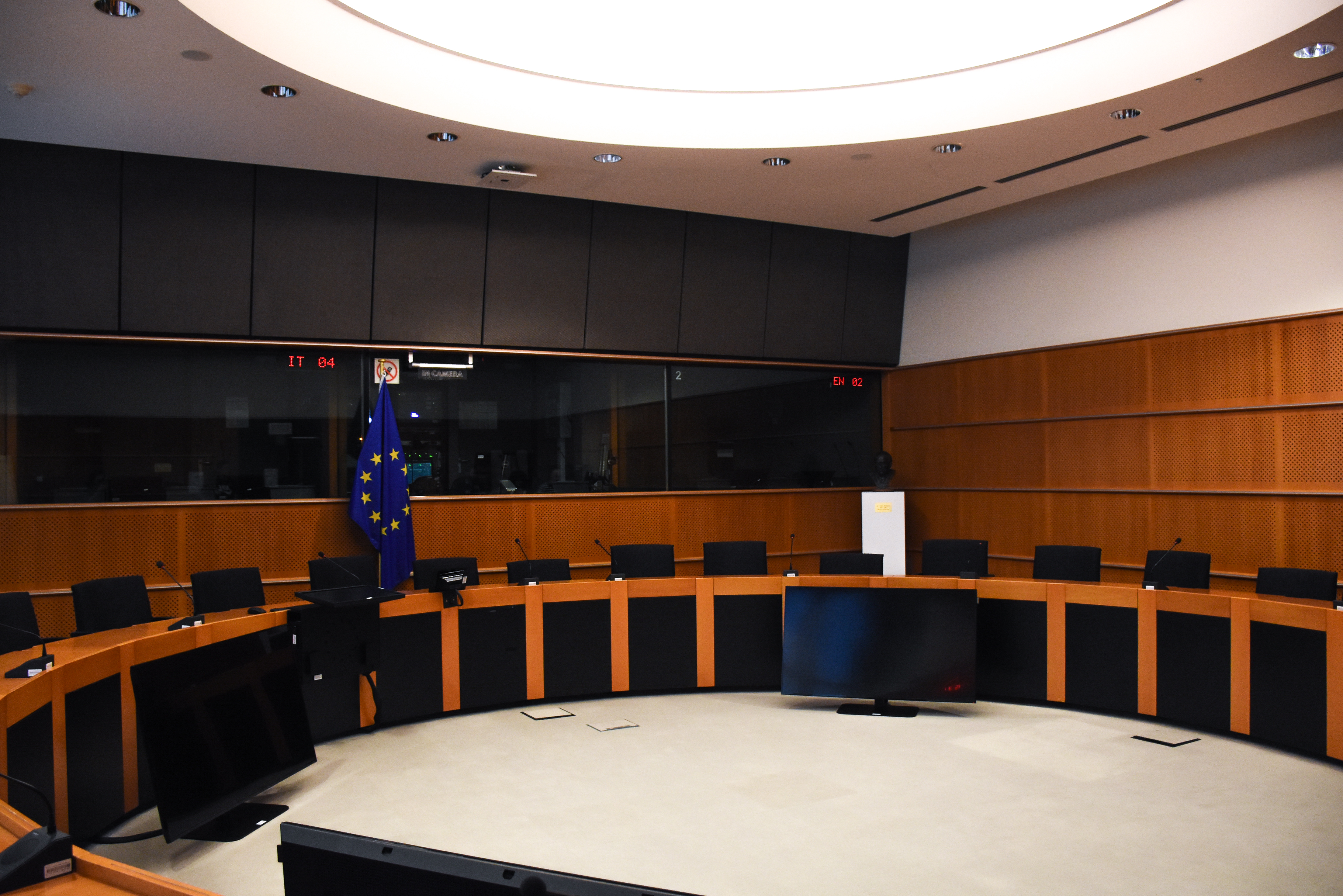 Dvorana Jožeta Pučnika v Evropskem parlamentu. Evropski parlament. Jože Pučnik Hall in the European Parliament. European Parlament.